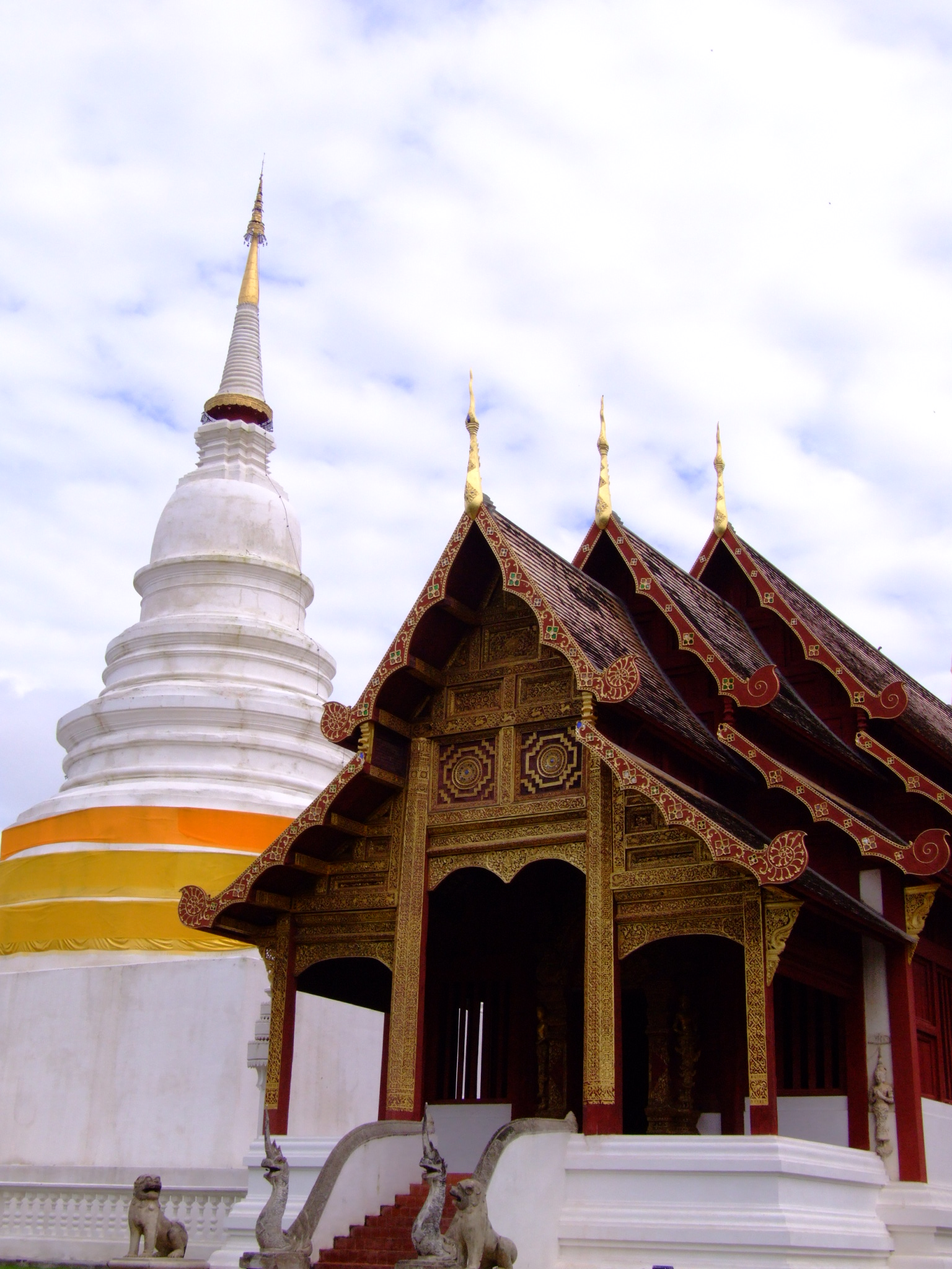 วัดพระสิงห์วรมหาวิหาร จ.เชียงใหม่ สัญญาอนุญาต The present photo is taken or owned by Thanyakij. The camera used was: Fujifilm Finepix S9500. หมวดหมู่:ภาพวัดไทย